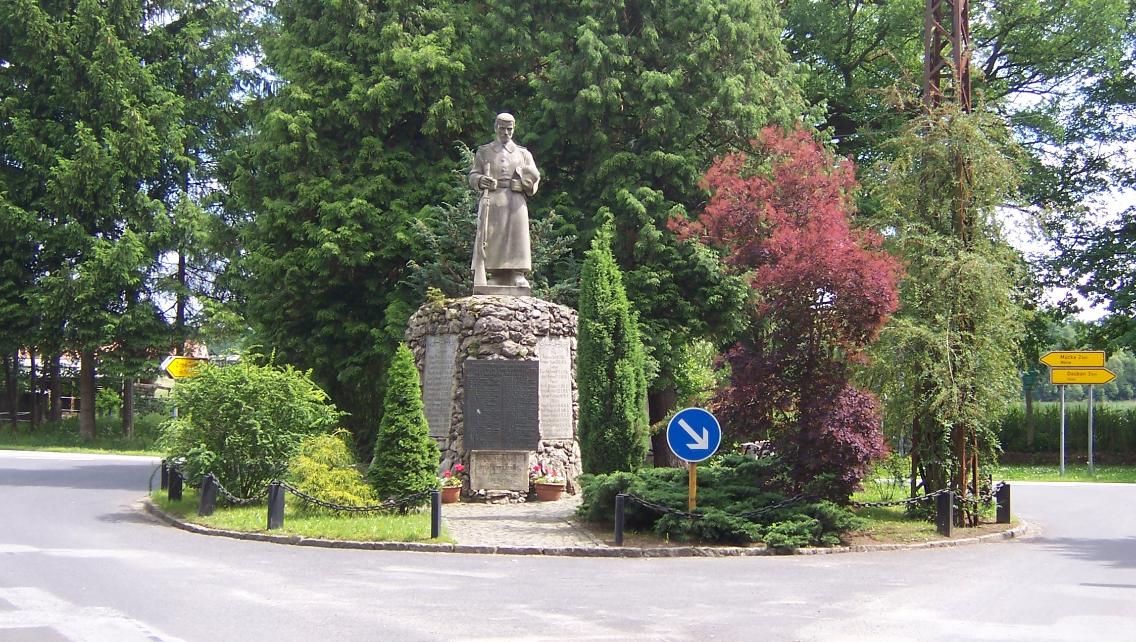 Weltkriegsdenkmal in Förstgen an der Kreuzung der Straße Mücka–Weigersdorf mit der aus Klitten kommenden Straße.